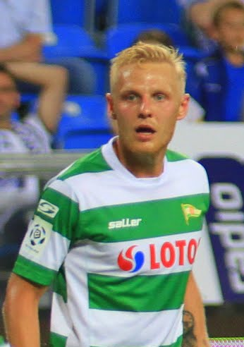 Daniel Łukasik w Poznaniu.